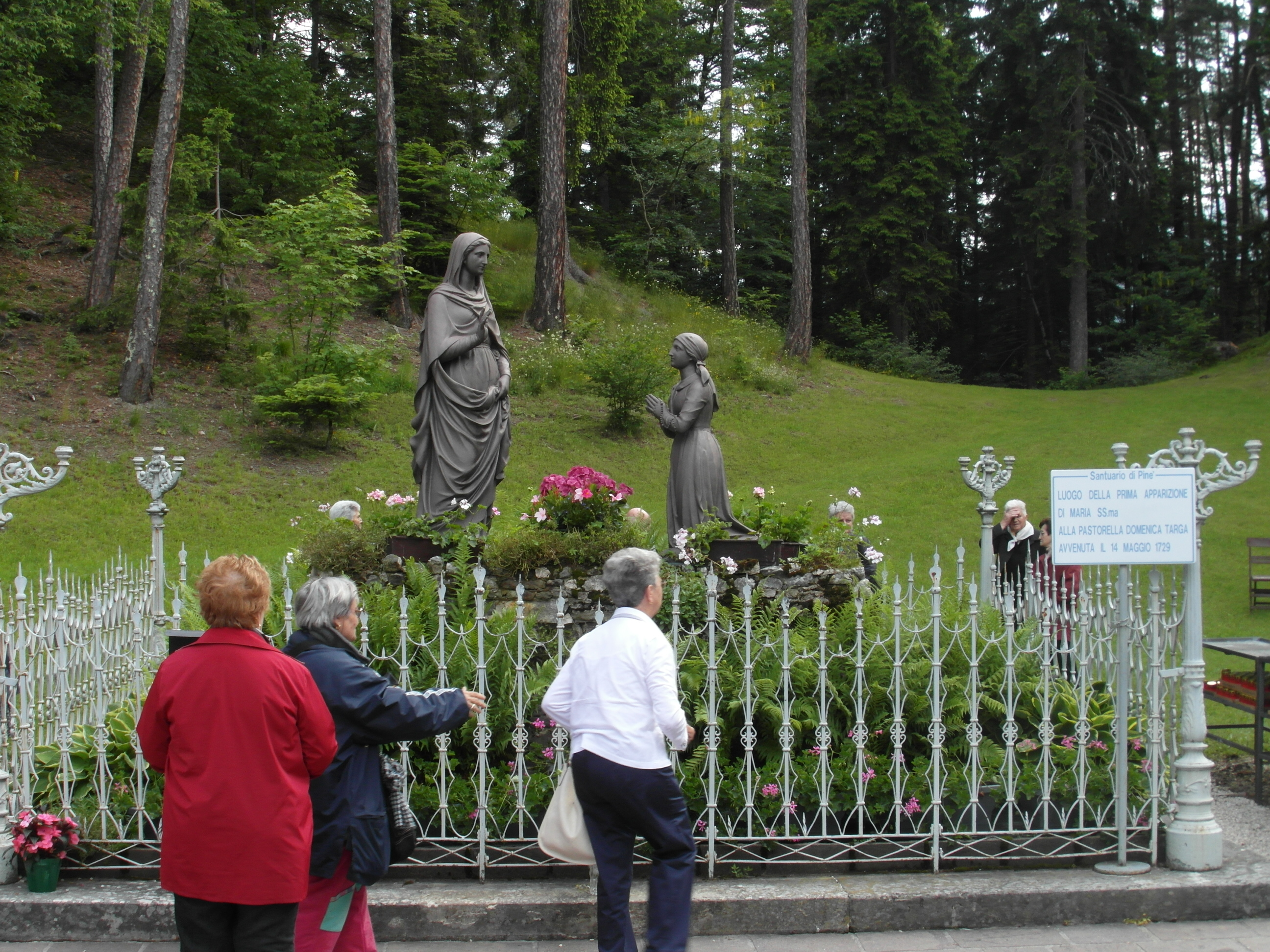 Riproduzione della comparsa - Santuario delle Comparse